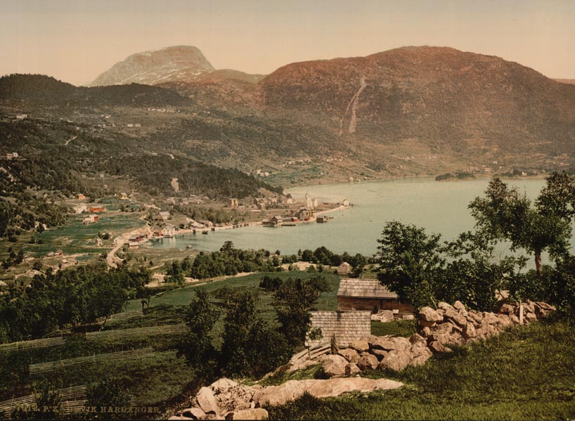 Ulvik Hardanger Hardanger Fjord Norway